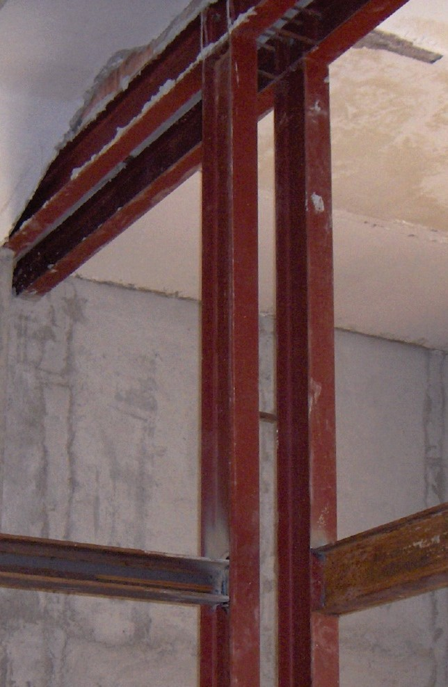 Esempio utilizzo profilati IPE e HE come elementi strutturali, nodi trave-colonna